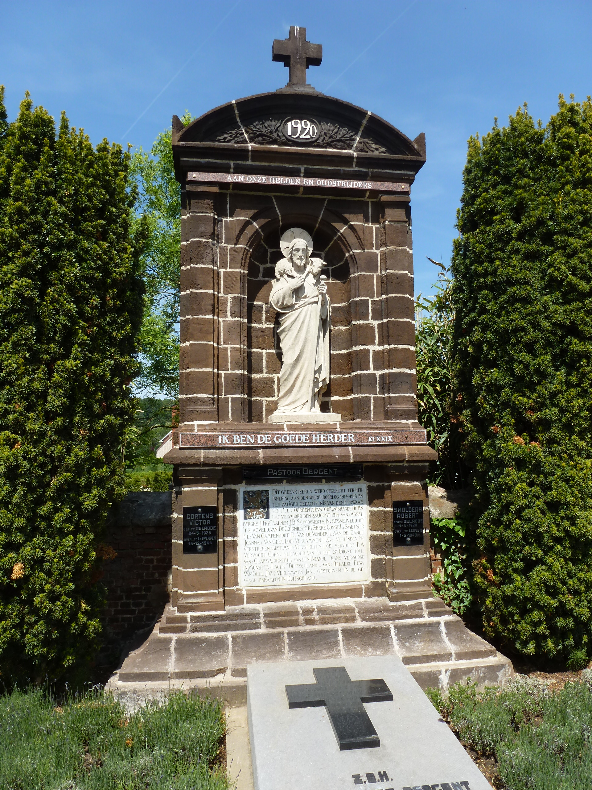 Aarschot Gelrode KH (5)